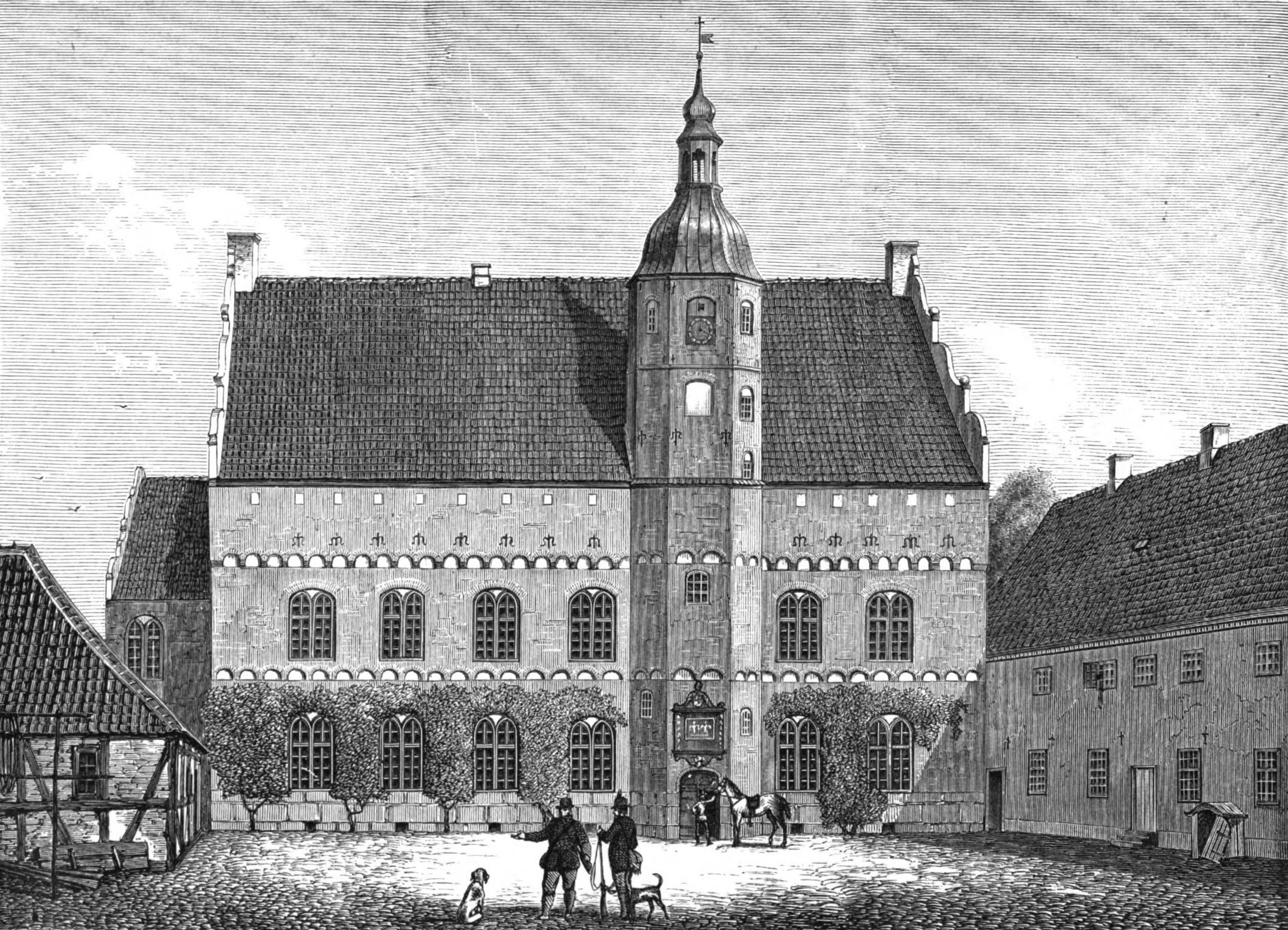 Herrgården Ørbæklunde vid Nyborg, Danmark.